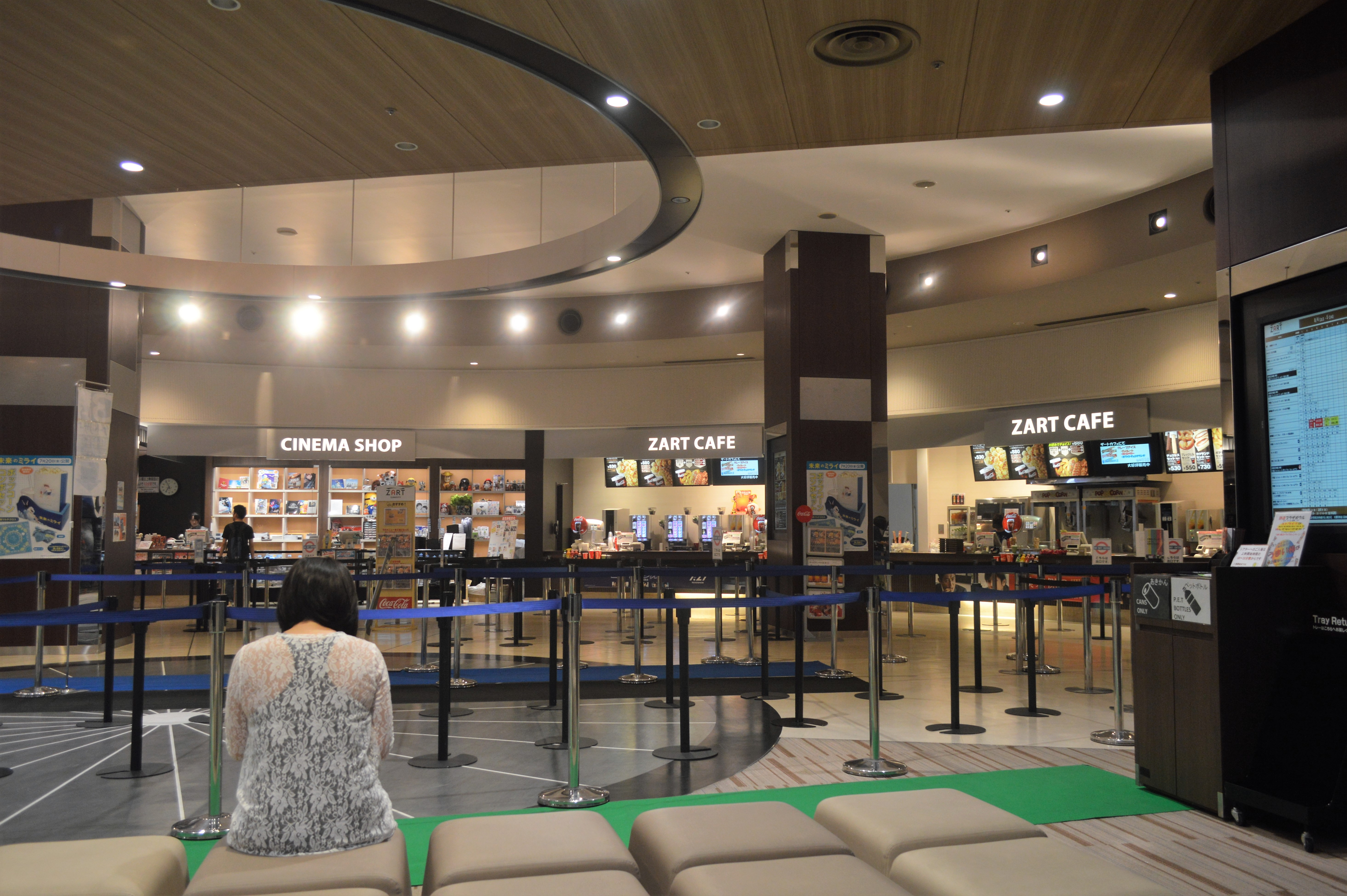 静岡市の新静岡セノバにある映画館（シネコン）「シネシティザート」。